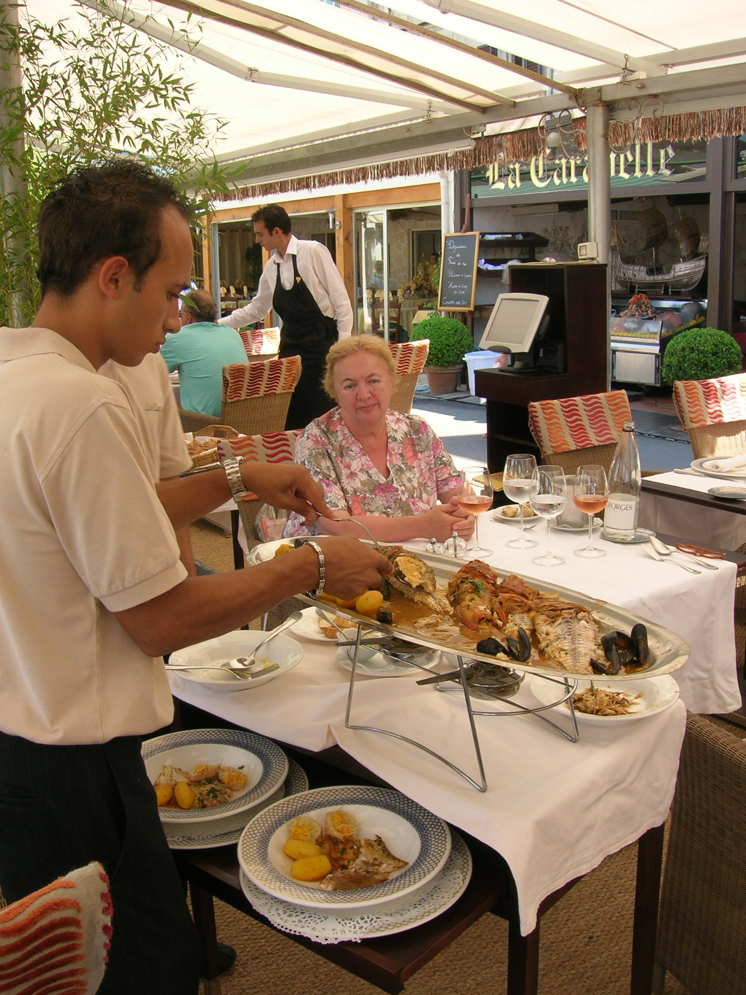 Eng Bouillabaisse gett preparéiert.